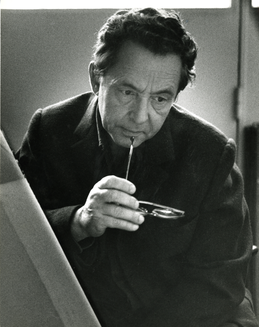 Milano. Galleria Lorenzelli. Interni. Ritratti di Hans Hartung. Servizio fotografico : Milano, 1960 / Paolo Monti. - Stampe: 3 : Positivo b/n, gelatina bromuro d'argento/ carta, 24x30. - ((Al verso di una stampa iscrizione didascalica con data manoscritta a matita: "1959/ Hans Hartung"; timbro a inchiostro con copyright: "© Copyright/ Credit to/ Paolo Monti/ Corso Sempione [...]/ Milano". - Sul coperchio della scatola iscrizione didascalica manoscritta a pennarello nero: "Ritratti/ Artisti". - Confronta scheda R14276-14292. - Occasione: Documentazione dell'incontro alla Galleria Lorenzelli per mostra: "Hartung: Aprile 1961", Milano, Galleria Lorenzelli, 1961. - Monografia: Hartung: Aprile 1961, Milano, Galleria Lorenzelli (1961). - Fonte: Periodico di Volta, C.: Conversazione con Hartung, in Metro, n°3, novembre 1961, pagg.8-13, Milano, s.n. (1961/11). - Fonte: Rubrica di Paolo Monti: Archivio fino 1-4-1961/ 31-3-1963 (1961-1963), presso Archivio Paolo Monti. - Fonte